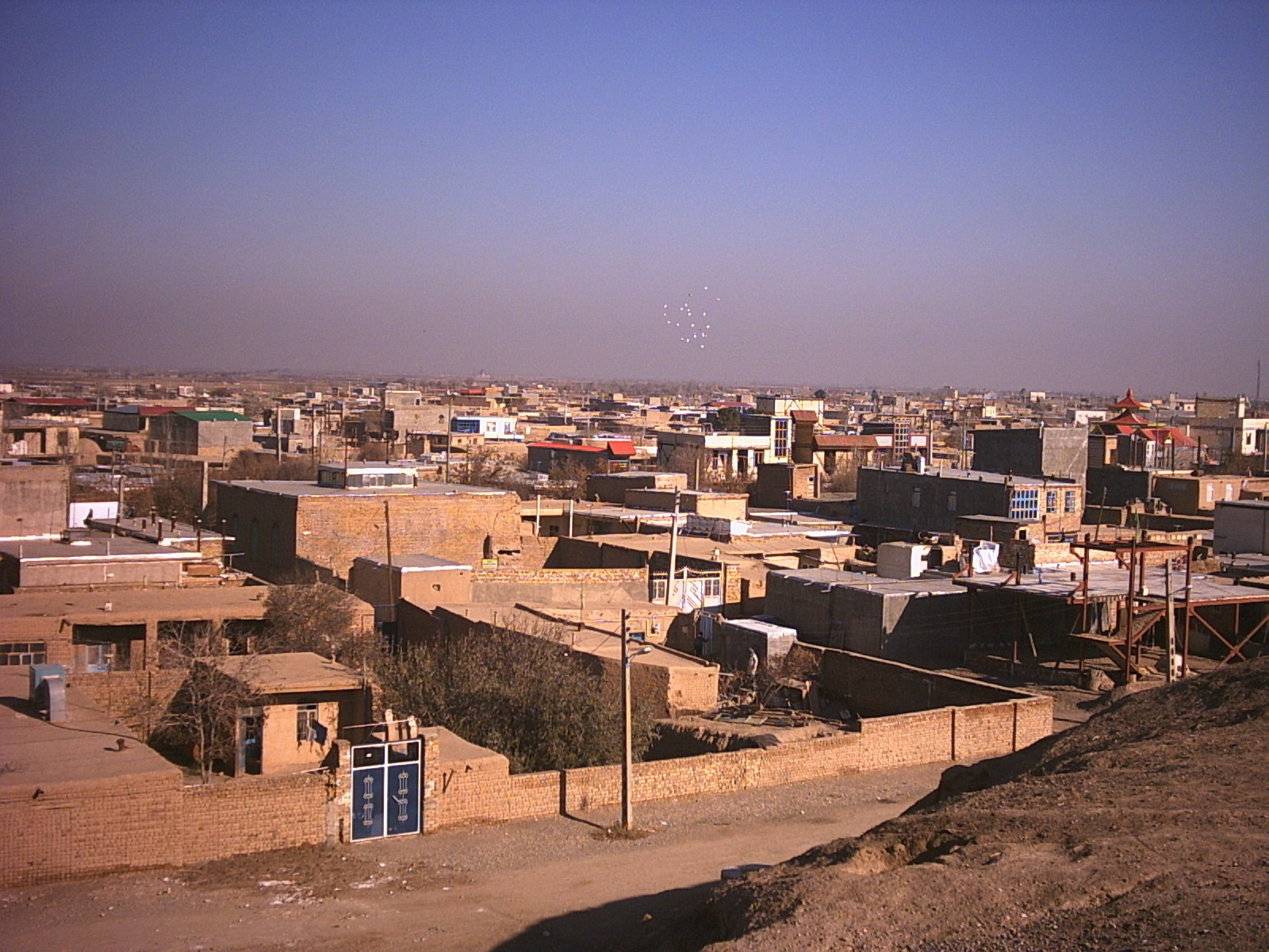 نمایی از شهر اسفرورین بر فراز تپه‌ای تاریخی که در مرکز شهر قرار دارد.